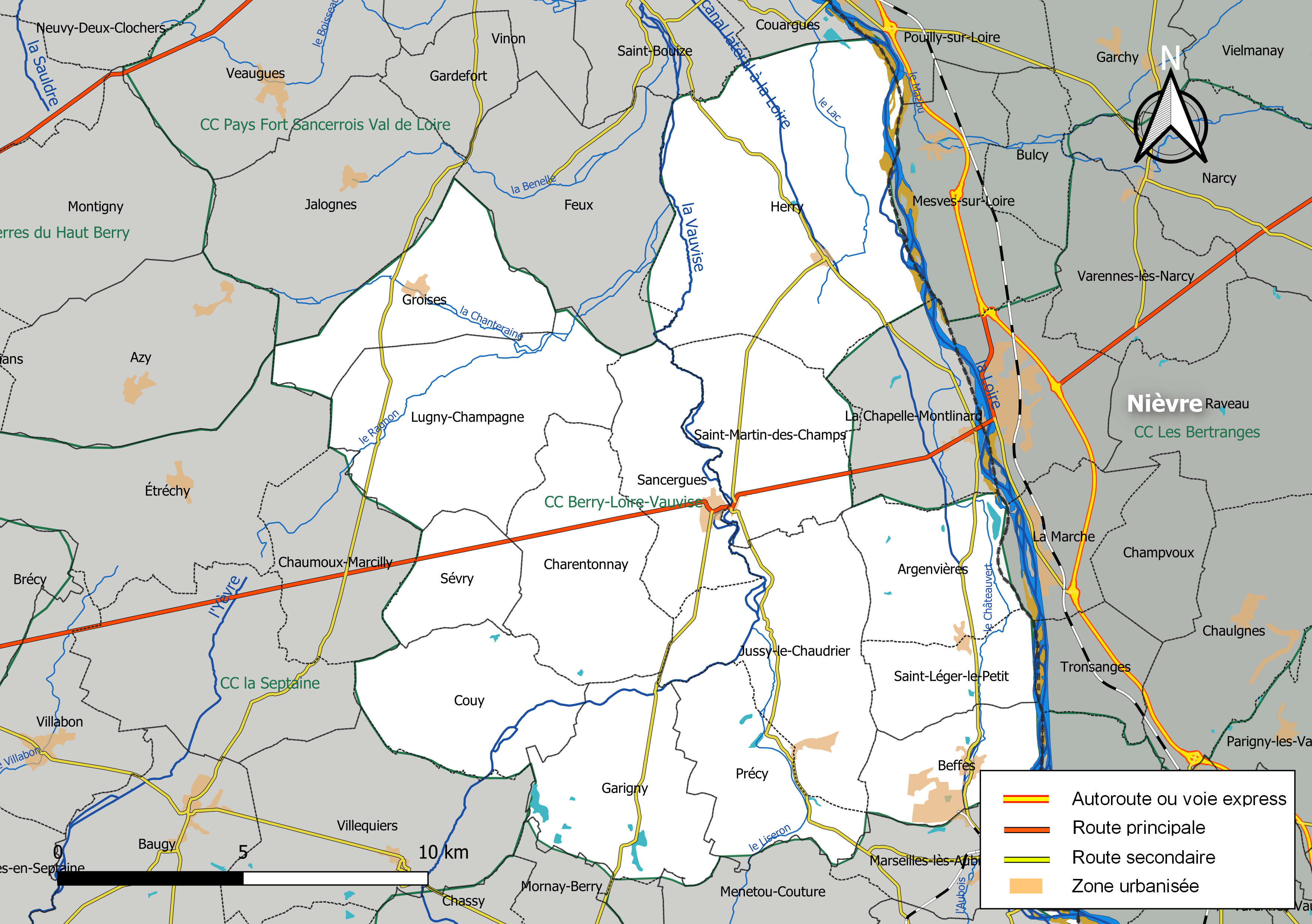 Carte géographique de la communauté de communes Berry-Loire-Vauvise, département du Cher, France. Composition au 1er janvier 2019.